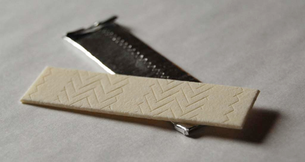 Ein Streifenkaugummi mit Verpackung.